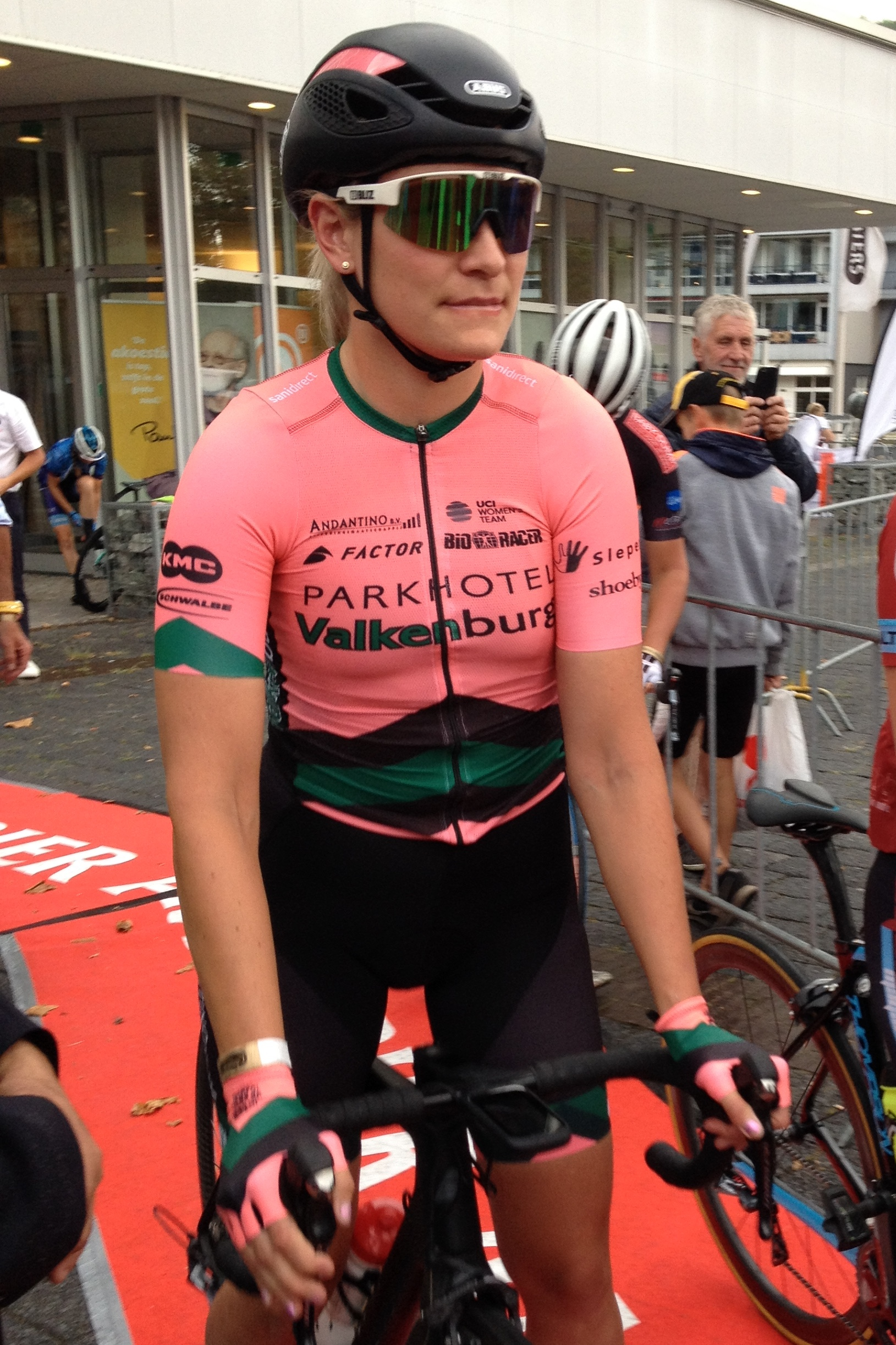 Criterium RaboRonde in Heerlen op vrijdag 2 augustus 2019